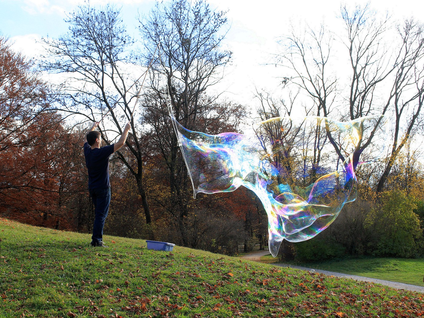 Mann mit Riesenseifenblase im Englischen Garten